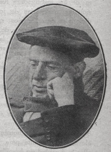 Jaime Vera.